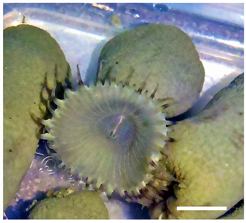 Sphenopus marsupialis, disco oral. Escala: 1 cm. James D. Reimer, Meifang Lin, Takuma Fujii, David J.W. Lane, Bert W. Hoeksema (2012) "The phylogenetic position of the solitary zoanthid genus Sphenopus (Cnidaria: Hexacorallia)" Contributions to Zoology 81(1)